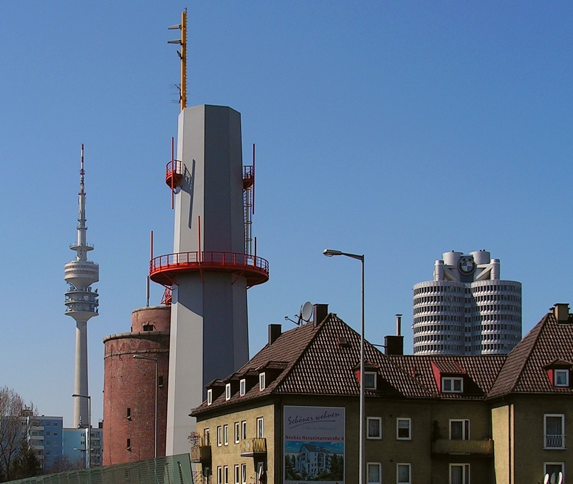 München Turm bzw. Türme nahe Petueltunnel am Fernsehturm bzw. Olympiaturm BMW-Vierzylinder-Hochhaus Hochbunker aus Mauerwerk Stahlturm als Abluft-Kamin für den Tunnel des Achitkten Luc Deleu Foto 2005 Wolfgang Pehlemann Deutschland PICT0067